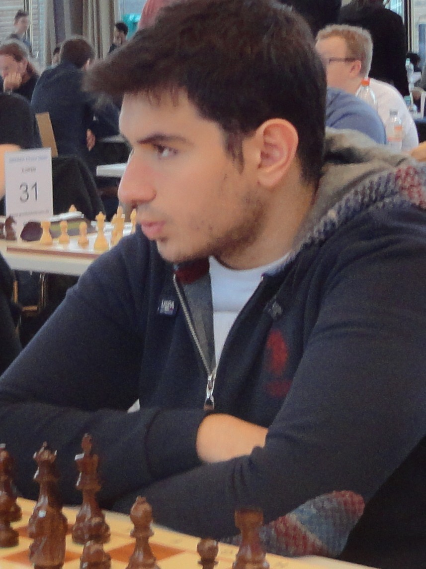 Cemil Can Ali Marandi, Grenke Chess Open 2016 in Karlsruhe.